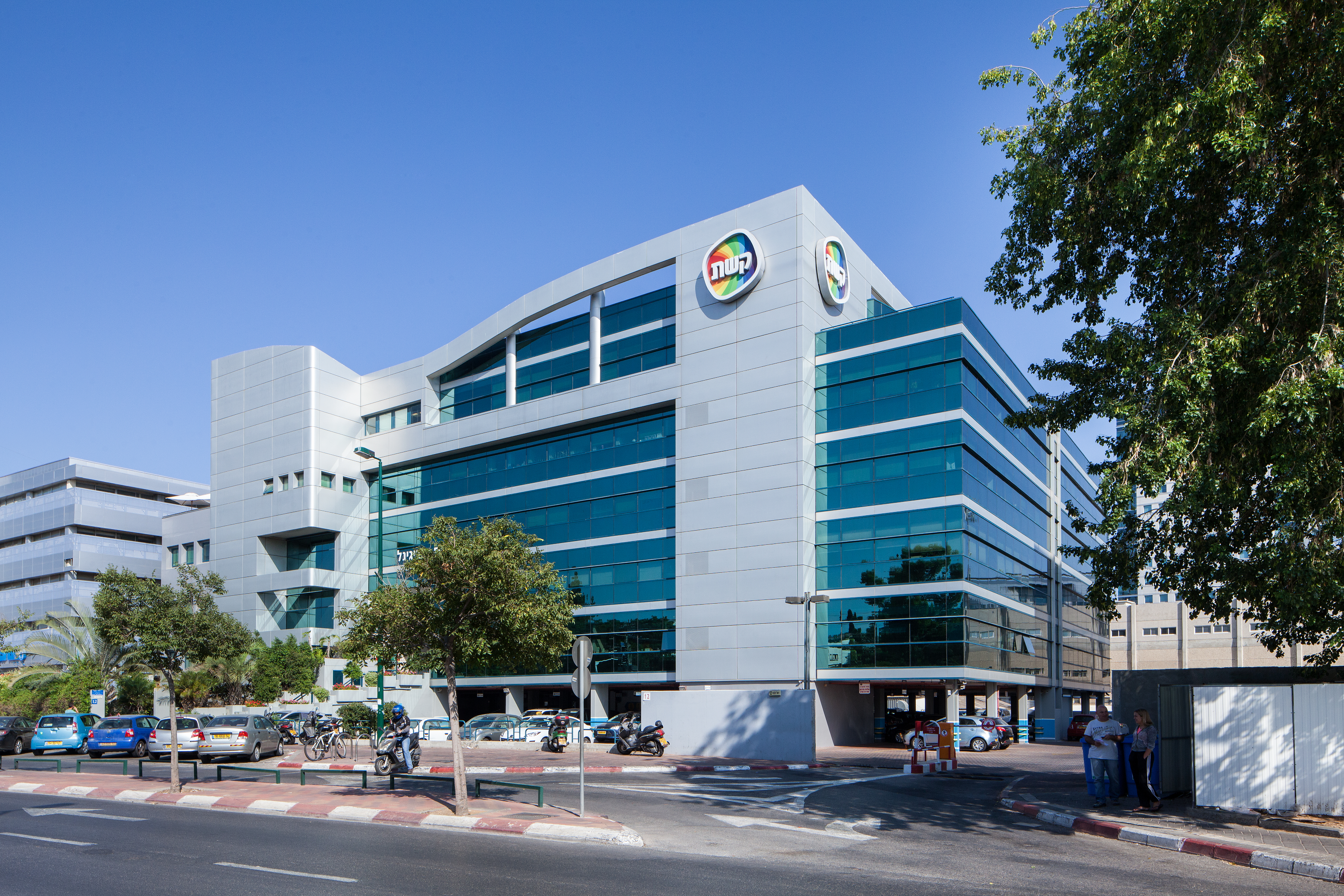 בניין שידורי קשת, רח' ראול ולנברג ת"א